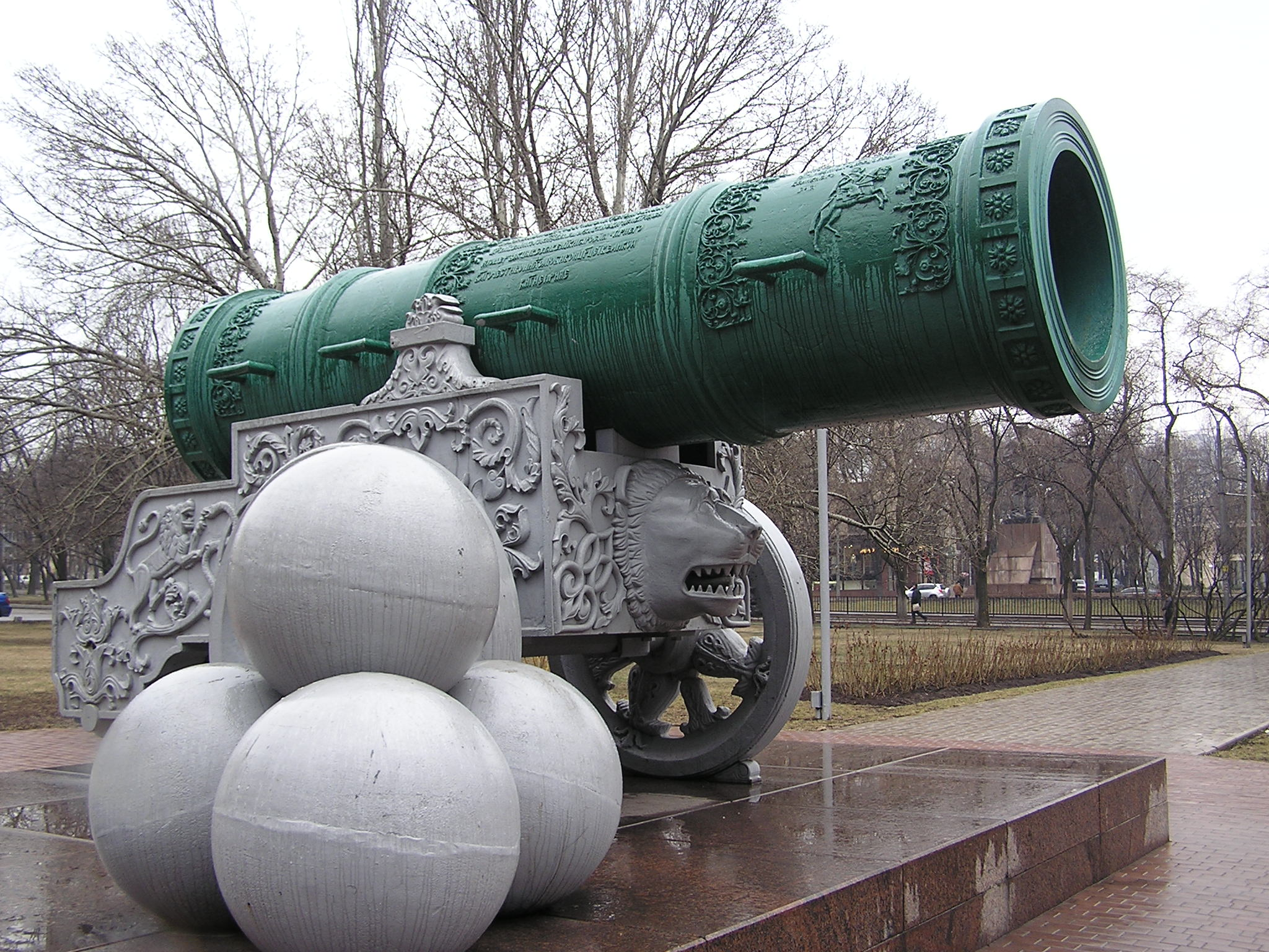 Копия Царь-пушки (1586 год) в Донецке Царь-пушка